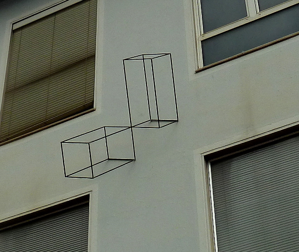 Gerhard Raab (* 1956): Satellit, Quadratstahl, 180/180/120cm, 2014.